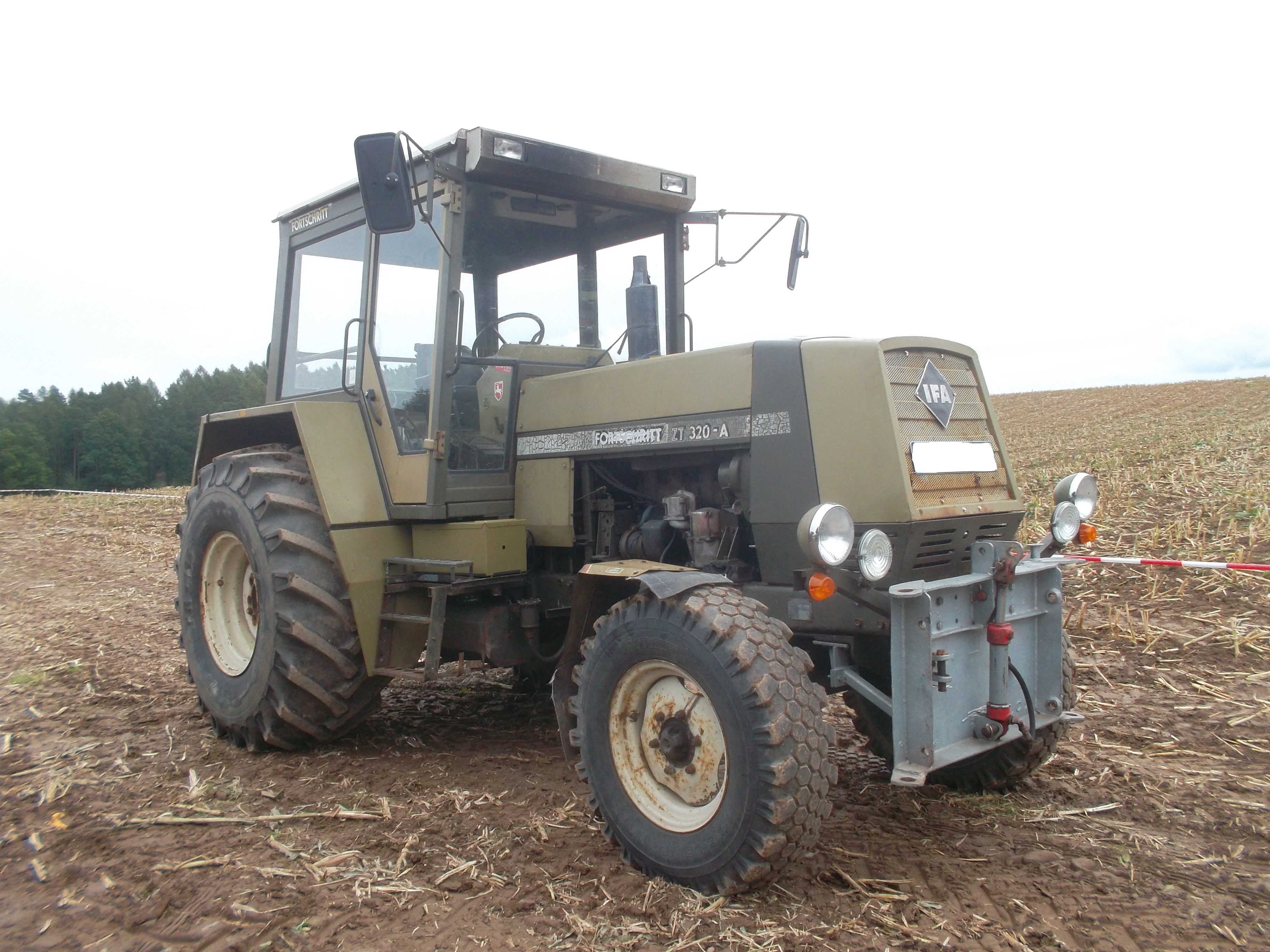 Ein Traktor der Marke Fortschritt Modell ZT 320-A